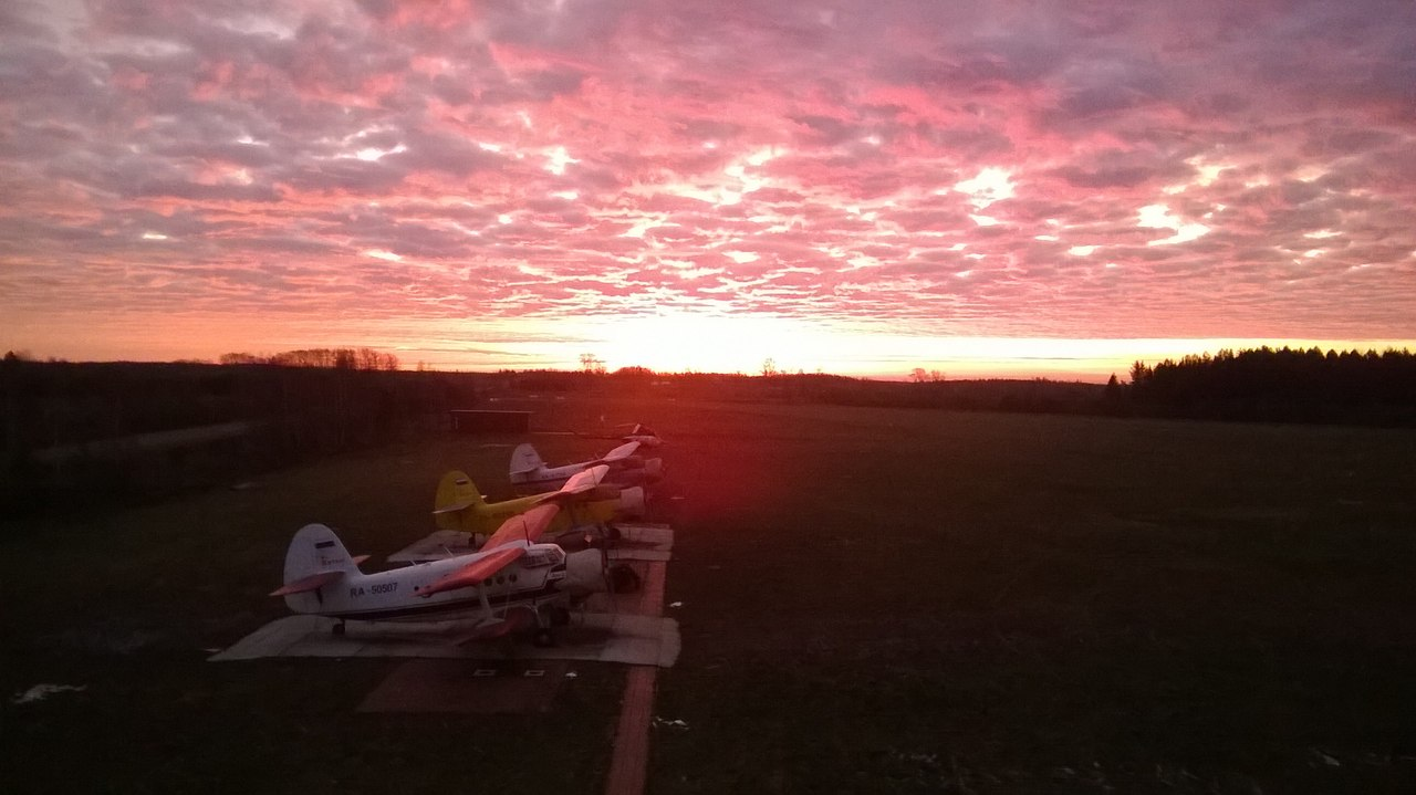 Восход солнца на ПП "Кучаны" (вид с КДП)